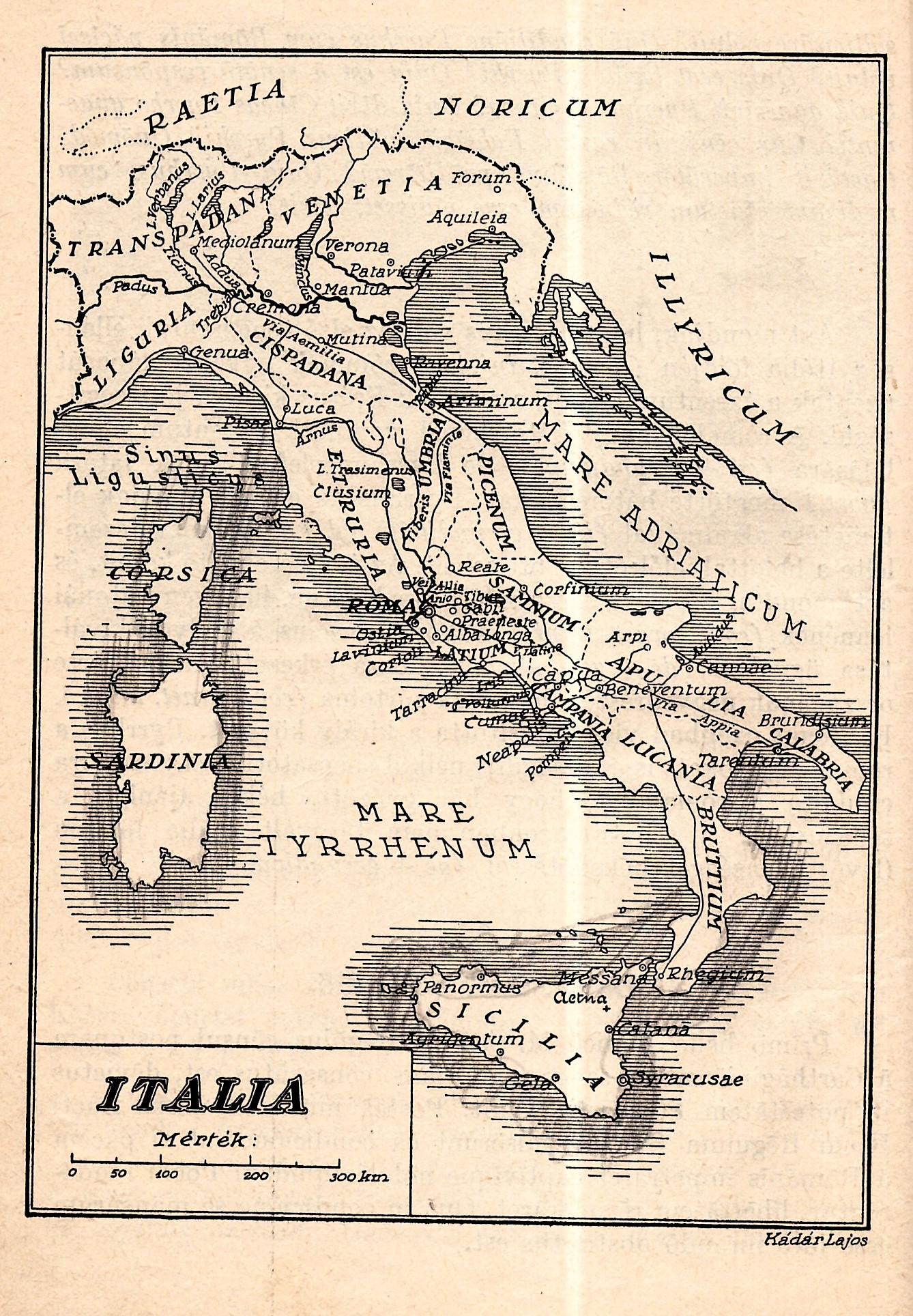 Térkép IN: Jirka Alajos: Latin olvasókönyv (1937)